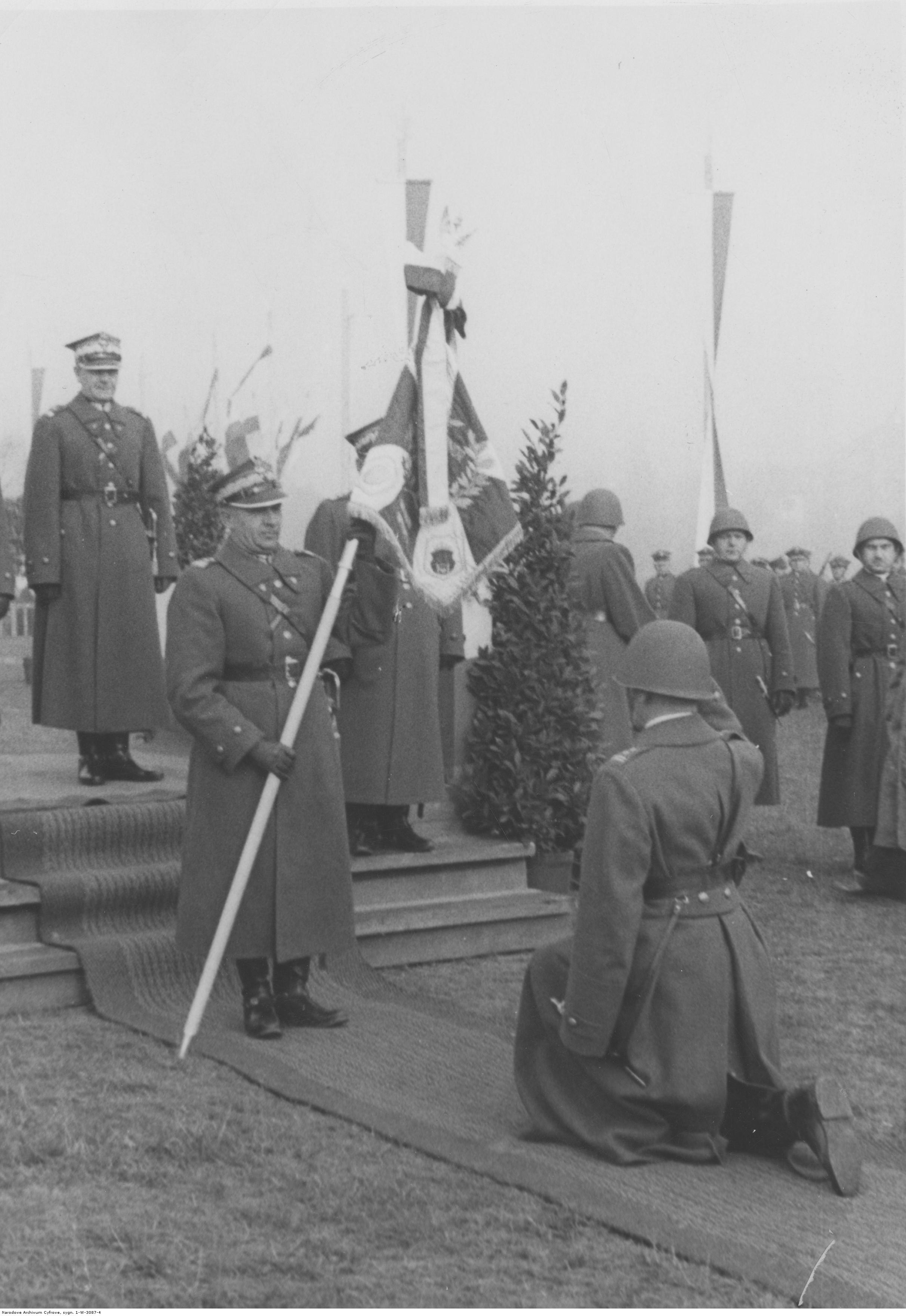 Wręczenie sztandarów jednostkom artylerii przeciwlotniczej - gen. Tadeusz Kasprzycki wręcza sztandar; Warszawa, listopad 1938. Koncern Ilustrowany Kurier Codzienny - Archiwum Ilustracji. Sygnatura: 1-W-3087-4